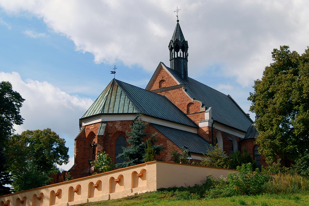 Izbica Kujawska - kościół p.w. Wniebowzięcia NMP, XV, pocz. XX w.